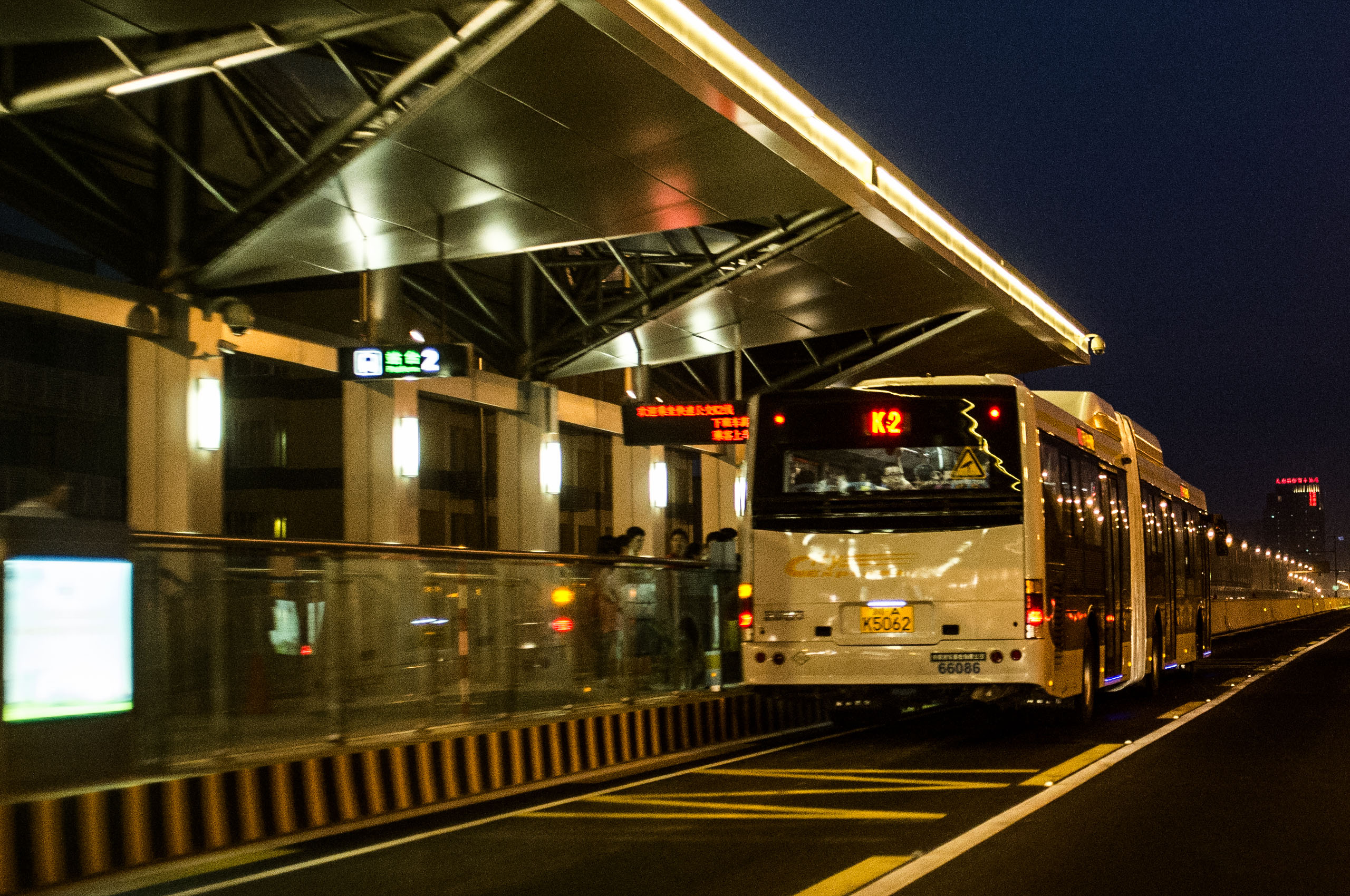 进站中的成都BRT K2车辆